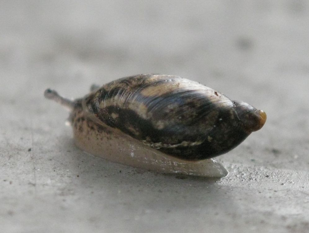 garden